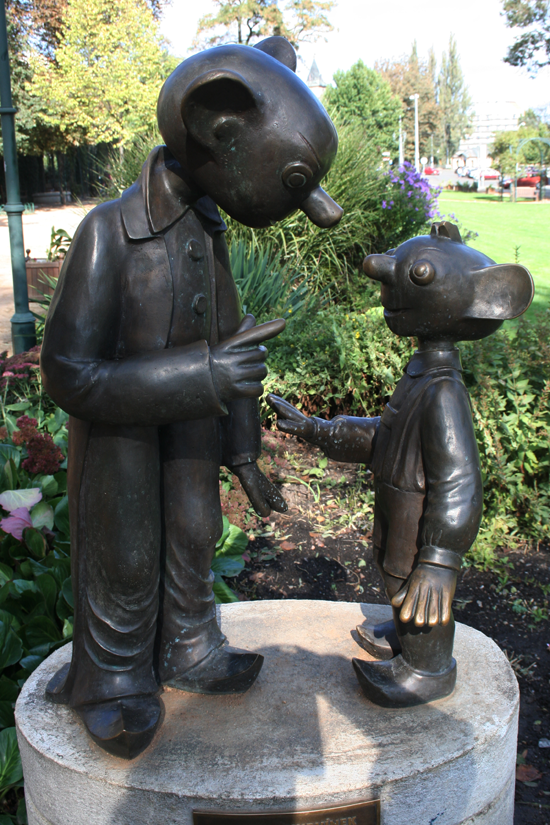 Spejbl a Hurvínek - památník na počest plzeňského loutkáře Josefa Skupy (Šafaříkovy sady, Plzeň)